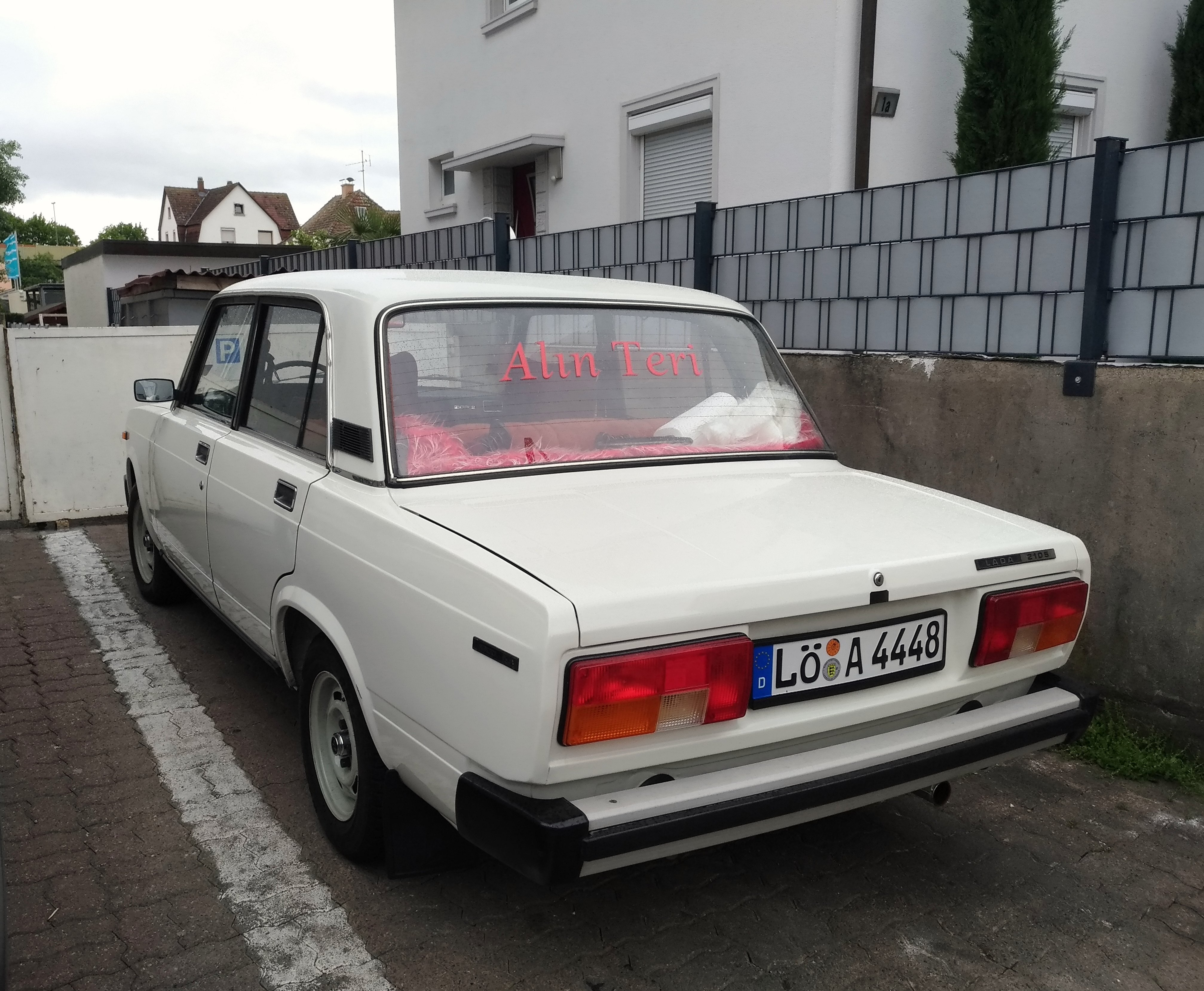 Lada 2105 at Lörrach